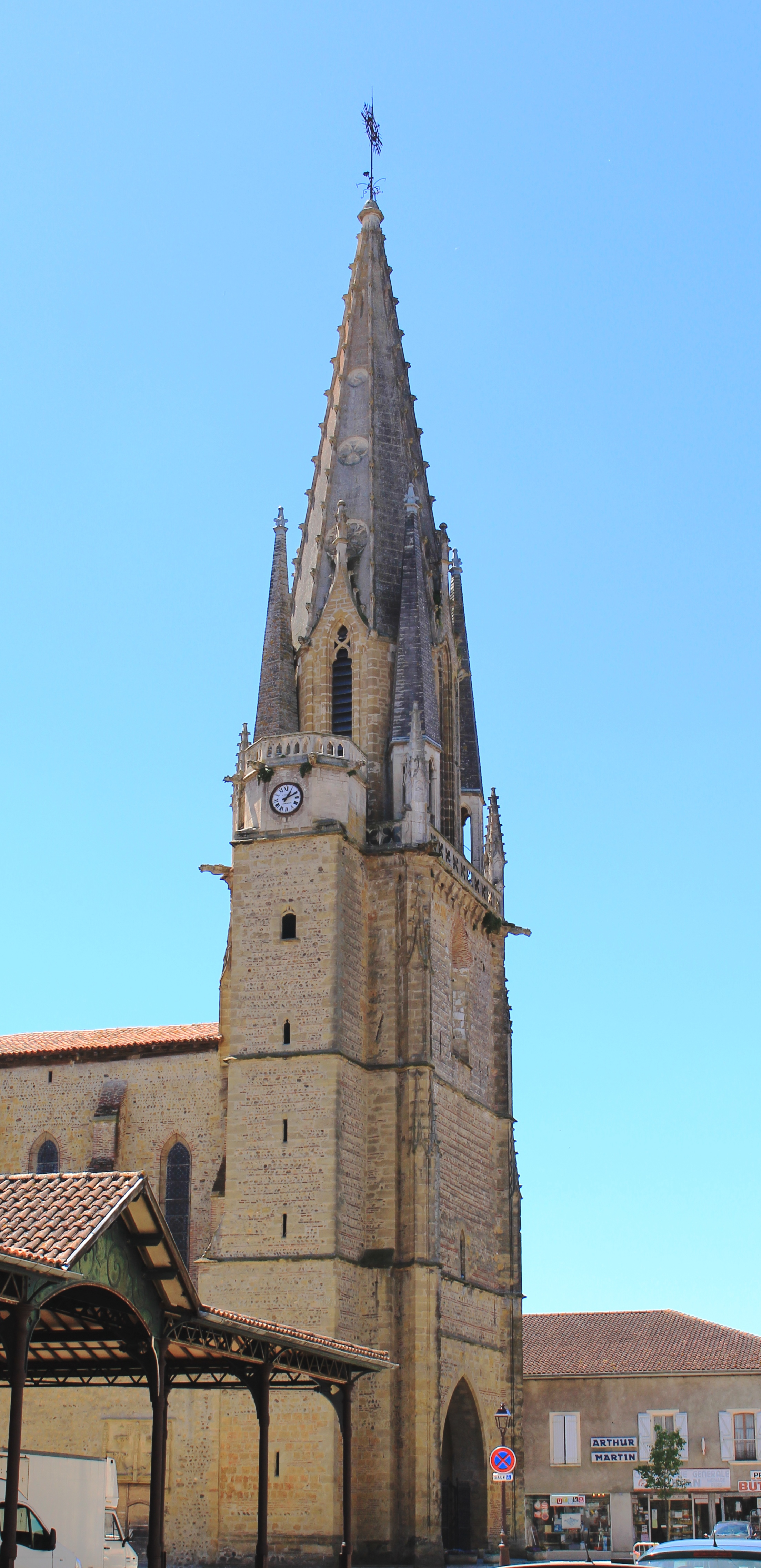 Église Notre-Dame-des-Neiges de Trie-sur-Baïse (Hautes-Pyrénées)